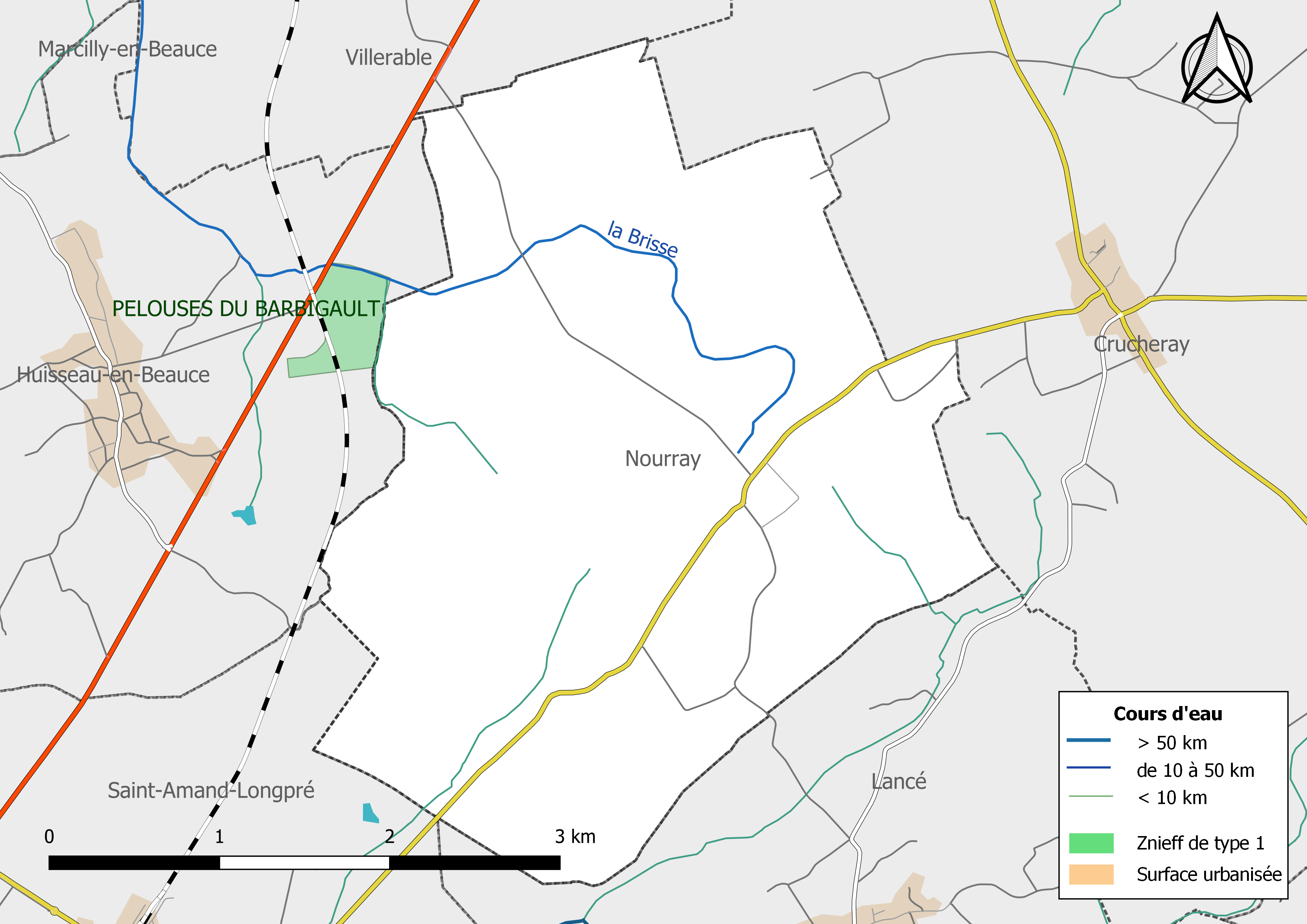 Zones naturelles d'intérêt écologique faunistique et Floristique (ZNIEFF) de type 1 de la commune de Nourray. (Loir-et-Cher, France).